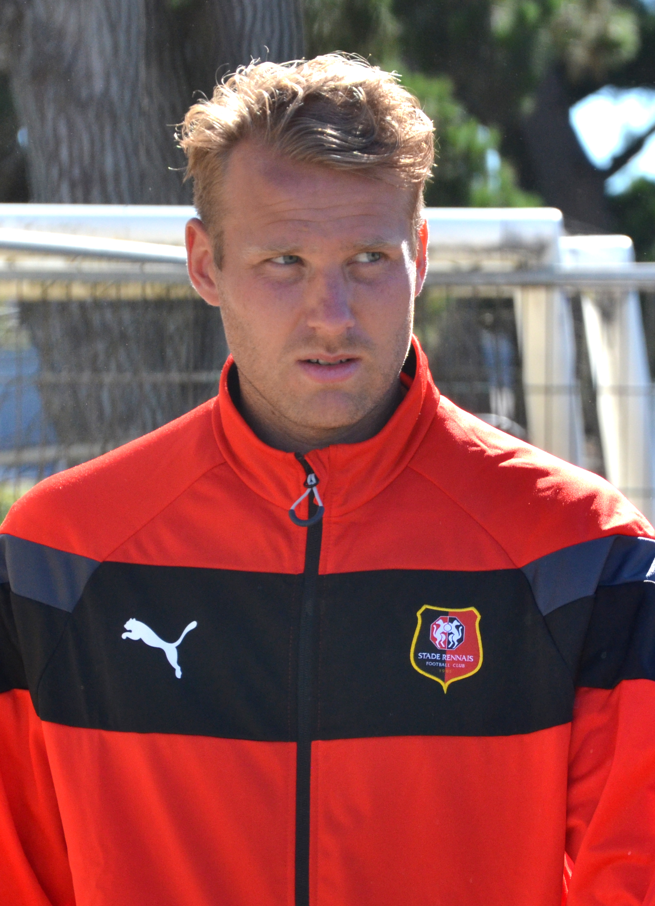 Photographie prise lors du match opposant le Stade rennais à l'USM Alger en match amical au stade Paul-Audrin de Dinard le 16 juillet 2016. Ici, Ola Toivonen.